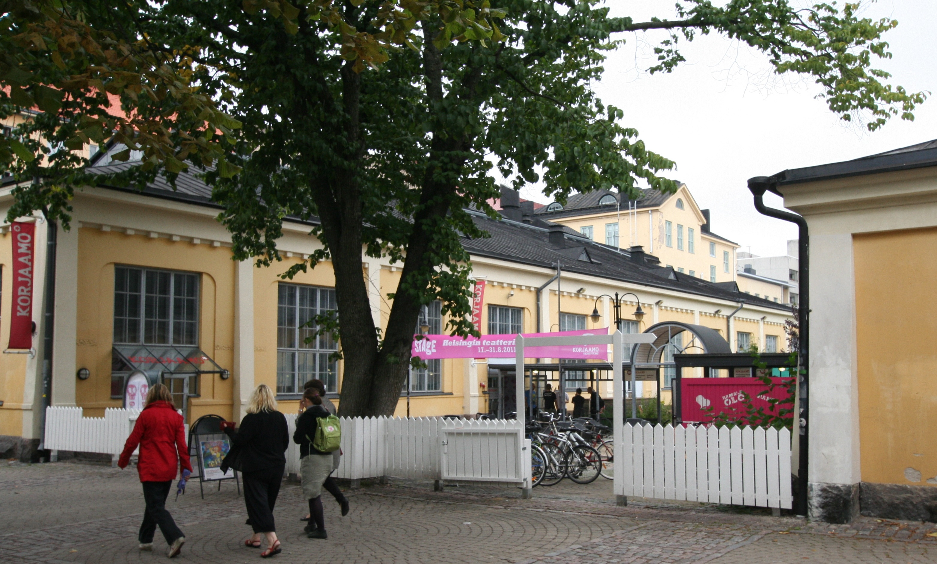 Kulttuurikeskus Korjaamo